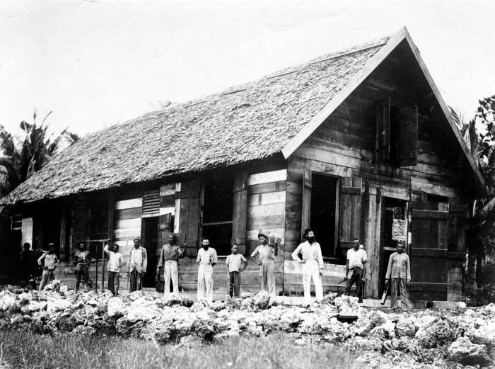 Repronegatief. Ambachtsschool te Langgur, Kai-eilanden.